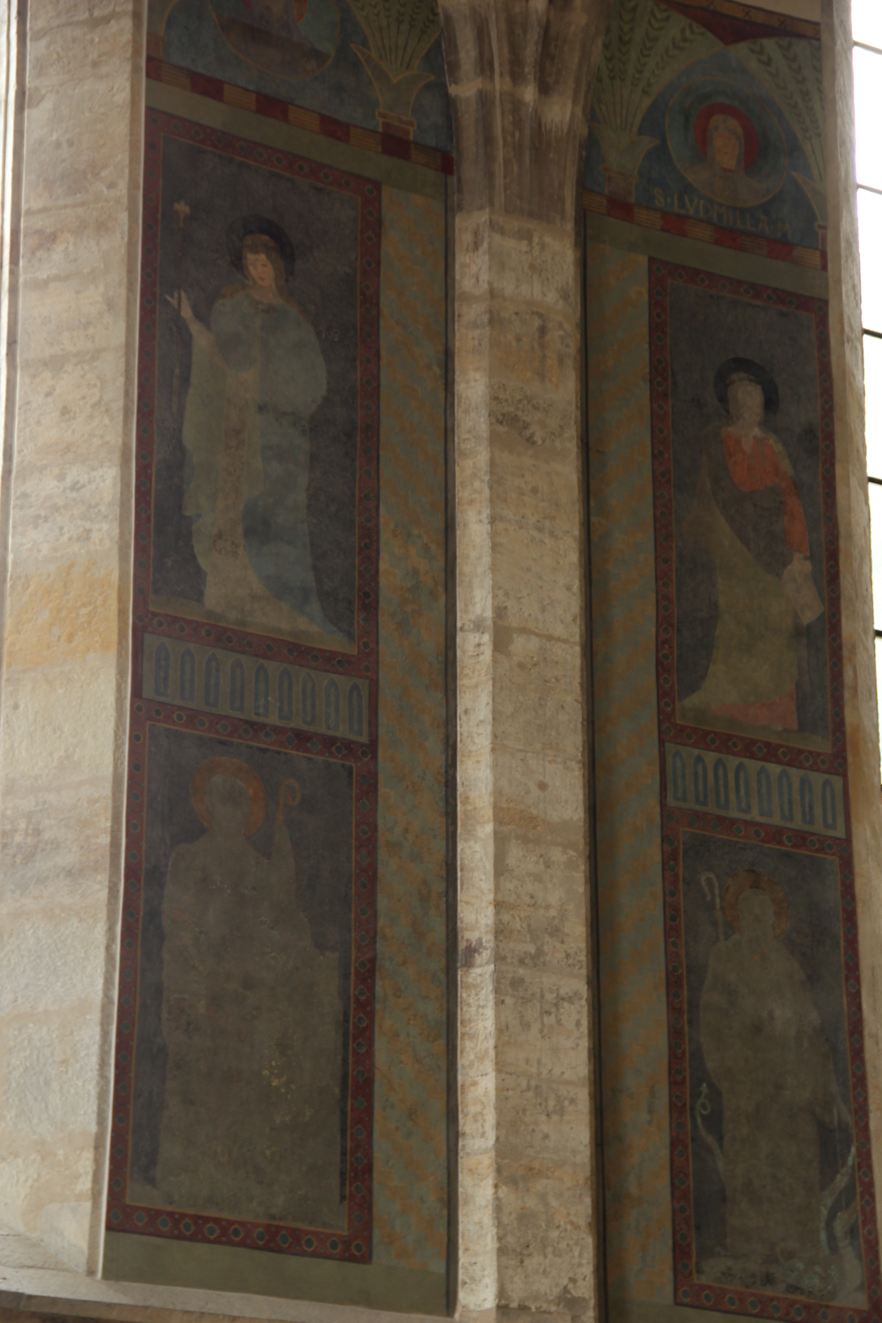 Maľby